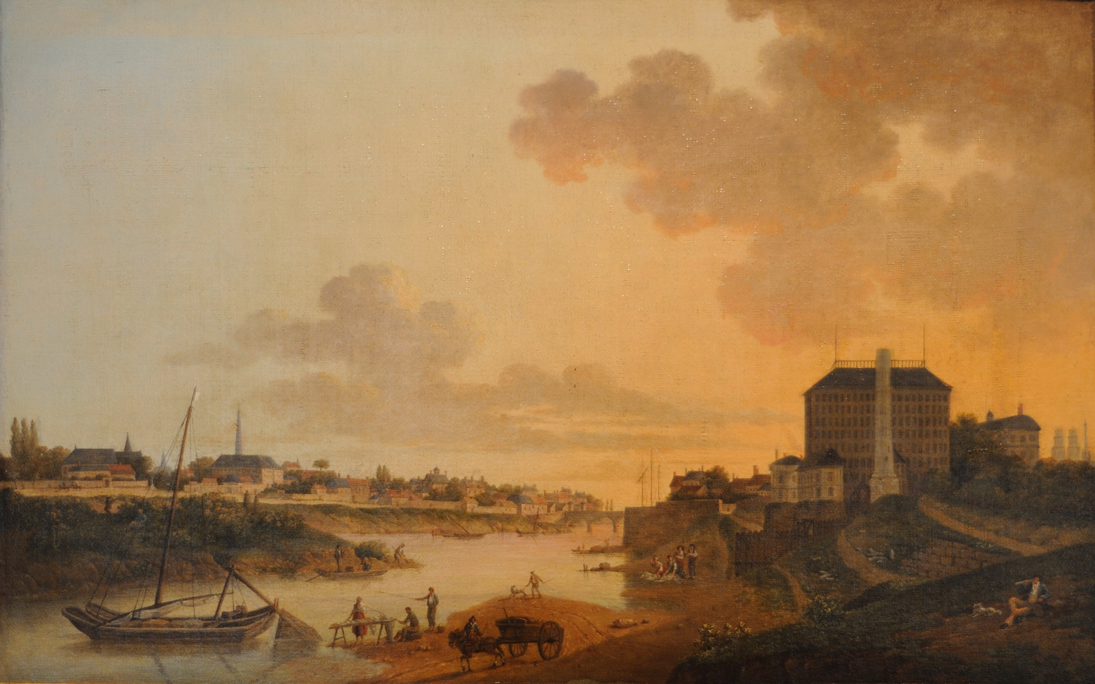 Vue de la filature prise du côté de Saint-Loup à Orléans, huile sur toileMusée historique et archéologique d'Orléans, Loiret, France